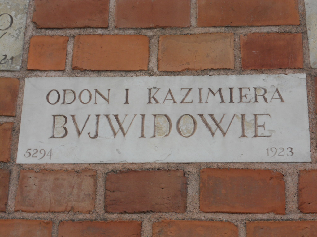 Cegiełka Odona i Kazimiery Bujwidów w murze fortu austriackego upamiętniającym ofiarodawców odnowy Zamku Wawelskiego, głowne wejście na Wawel, Kraków.